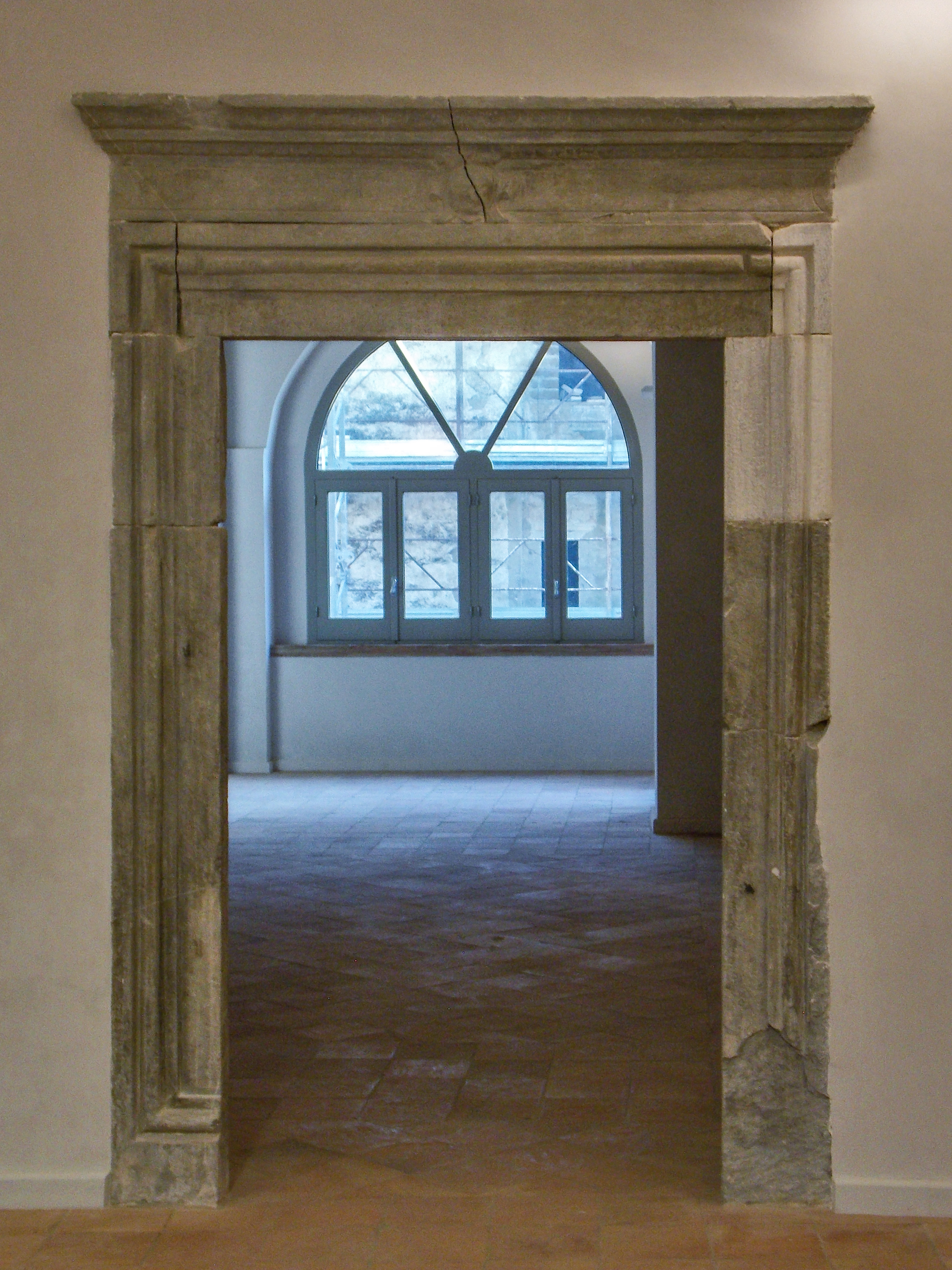 L'ex monastero benedettino di San Vittorino a Benevento. La zona recuperata per il Conservatorio Statale di Musica Nicola Sala